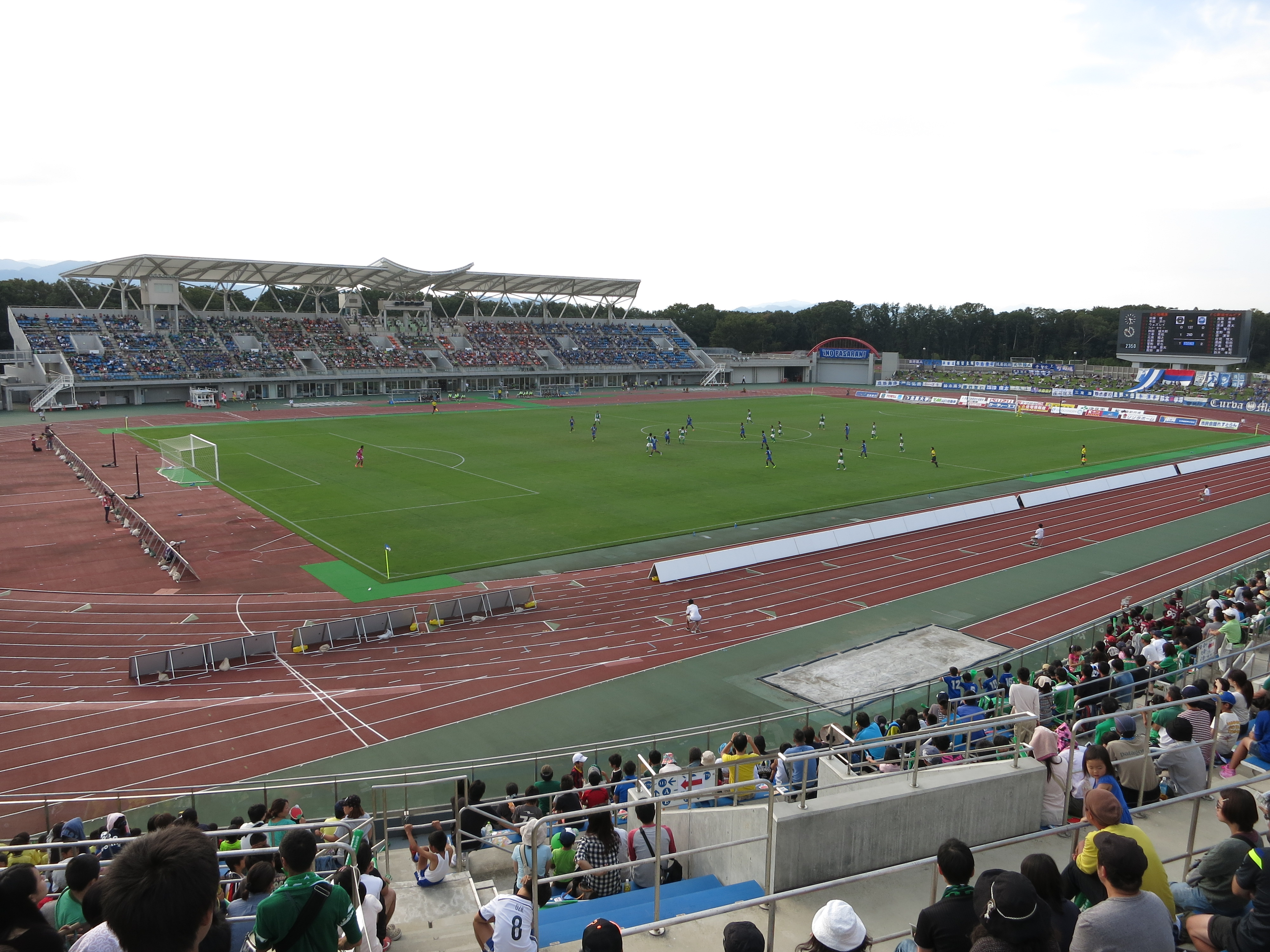 麻溝公園競技場メインスタンド